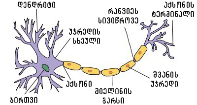 ნეირონის სხვადასხვა ნაწილთა მონიშვნა